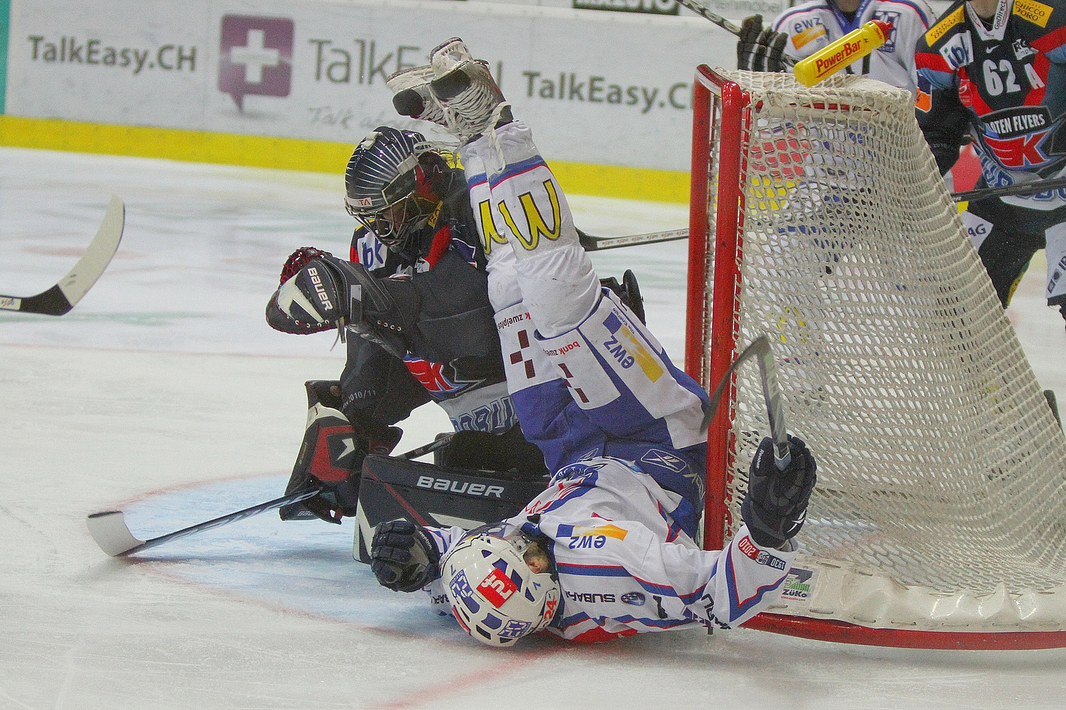 Ronnie Rüeger est gêné par Thibaut Monnet lors d'un match opposant les Kloten Flyers au ZSC Lions